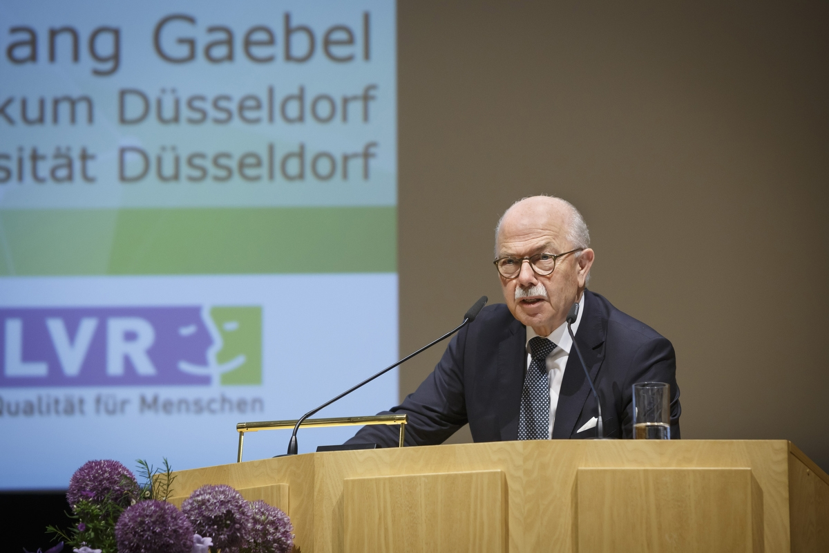 Festsymposium "Psychiatrie und Psychotherapie" anlässlich des 70. Geburtstages von Prof. em. Dr. Wolfgang Gaebel am 18. Mai 2017